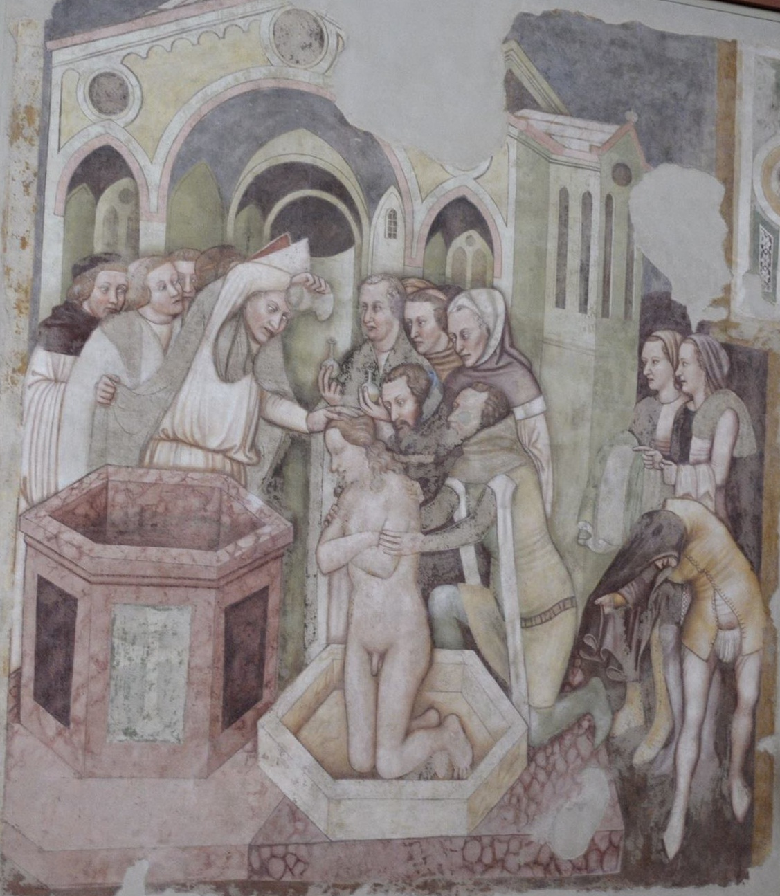 Tomaso da Modena - battesimo del principe